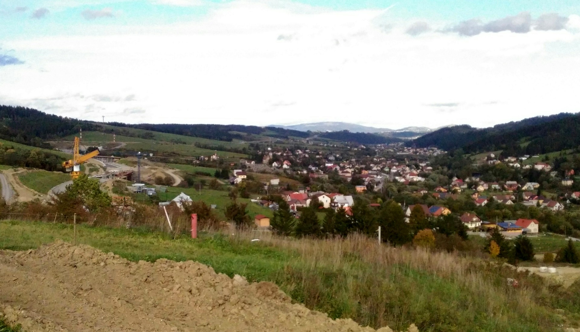 Jablunkovské medzihorie z osady Pod Hájkou, na svahoch pohoria je vedená diaľnica D3. V popredí Svrčinovec, za ním Čierne. Na obzore poľská časť Sliezskych Beskýd s vrchom Ochodzita (vpravo)